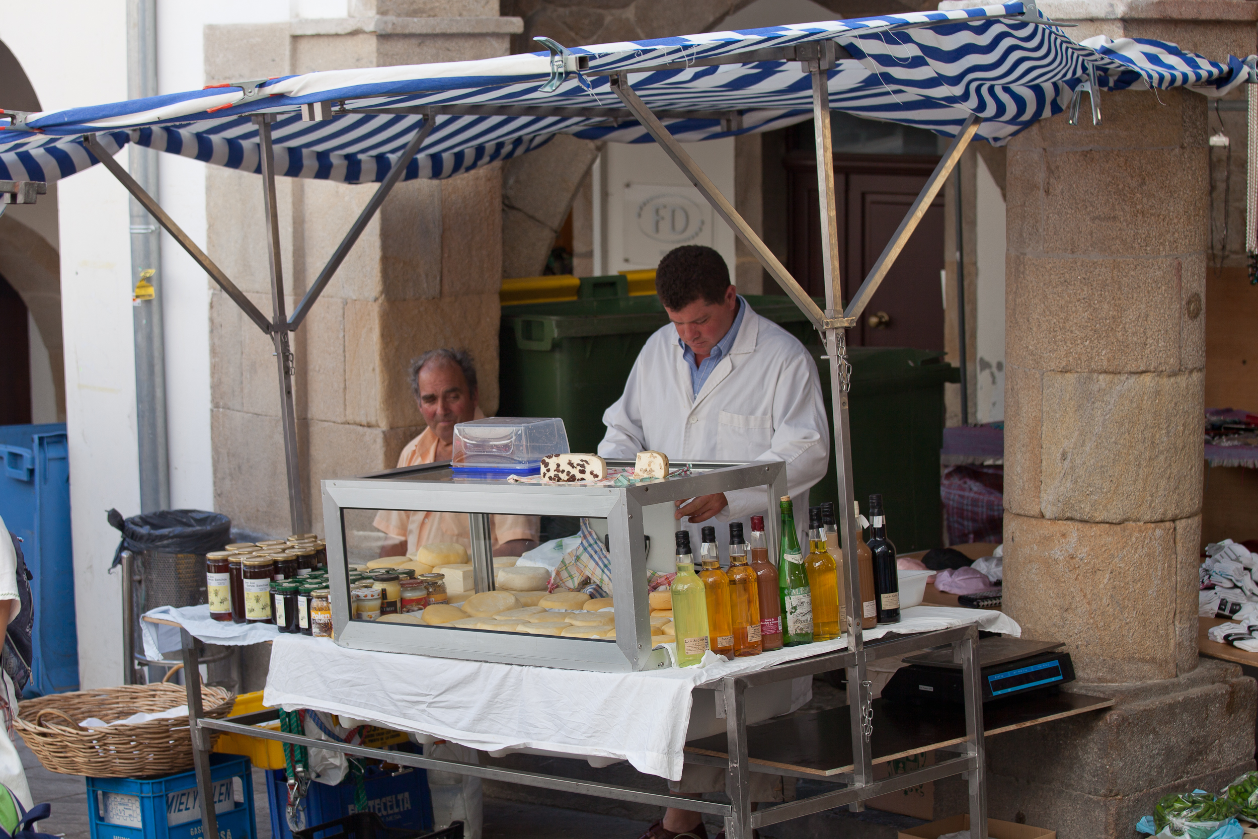 Mercado en Noia, Galicia (Spain)